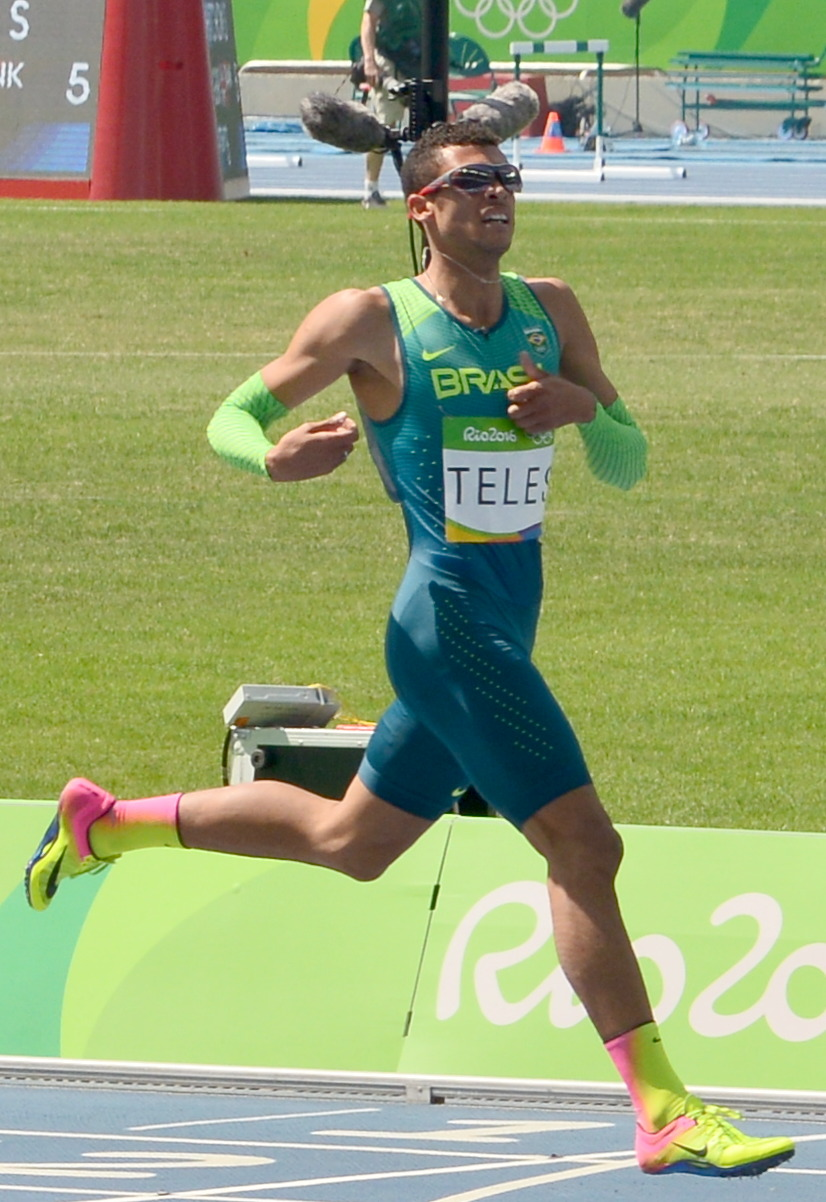 Quelques séries du 400m haies des jo de Rio 2016